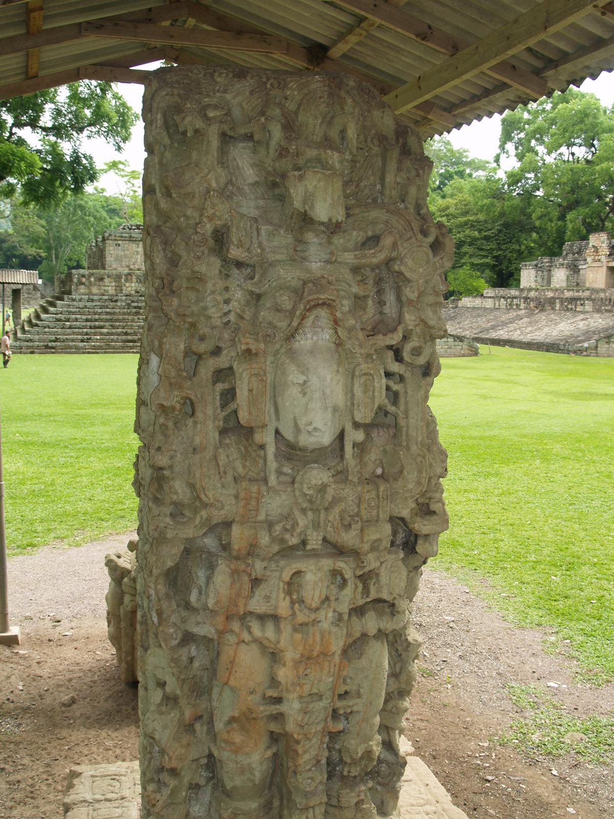 Copan Ruinas, Honduras